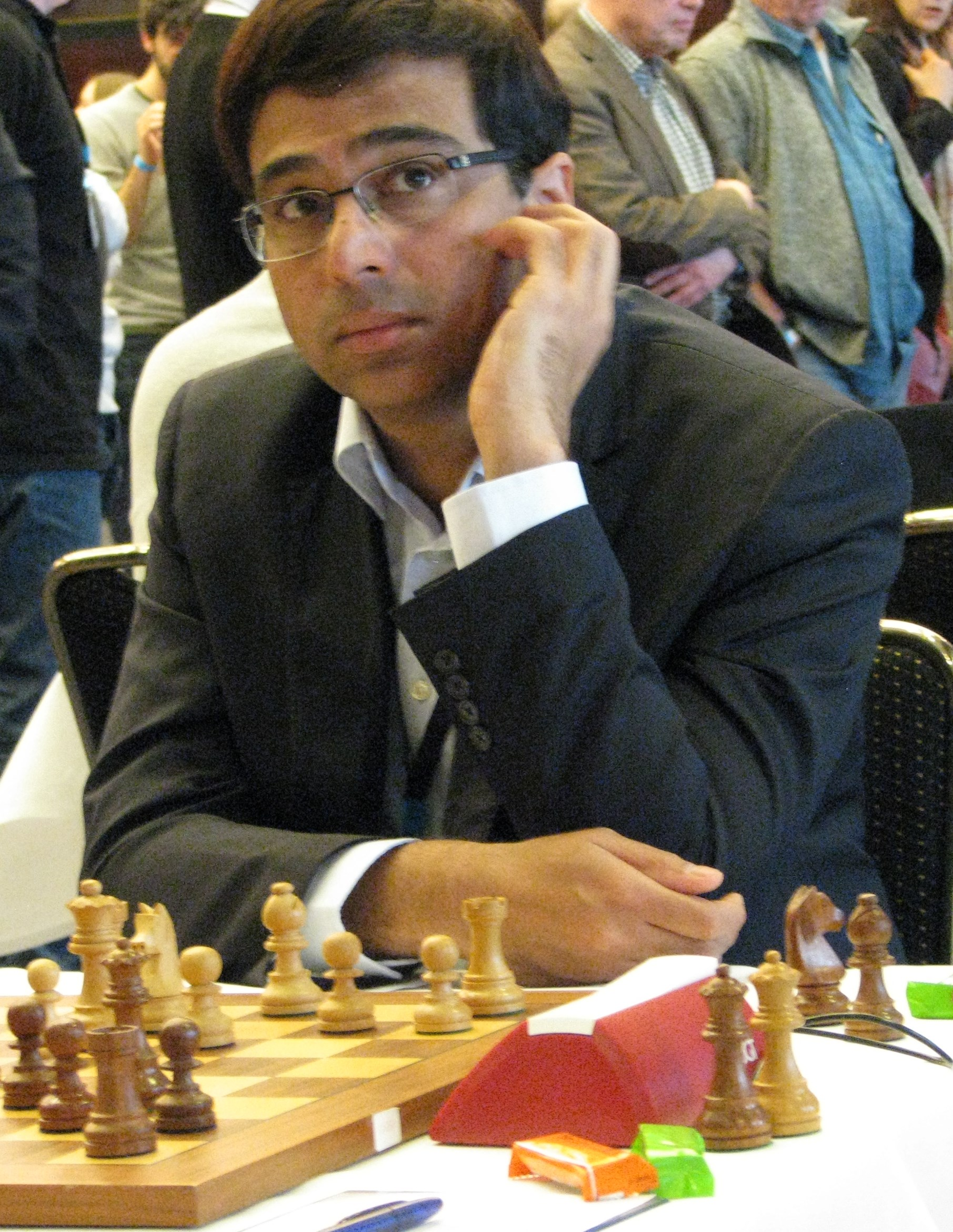 Vishwanathan Anand für die OSG Baden-Baden bei der Bundesliga-Finalrunde 2017 in Berlin